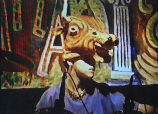 Diego Silveira, da Banda Aristóteles de Ananias Jr, em show no bar Porto de Elis